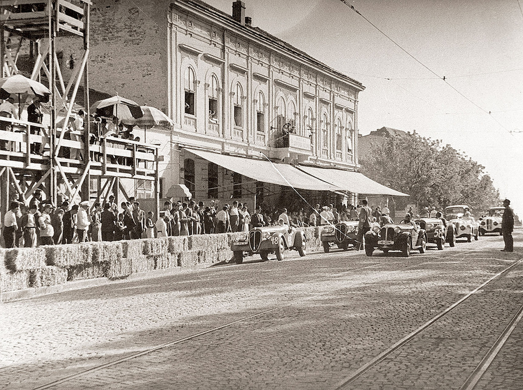 Preteča formule 1 na Kalemegdanu - Međunarodne automobilske i motociklističke trke održane 3. septembra 1939.